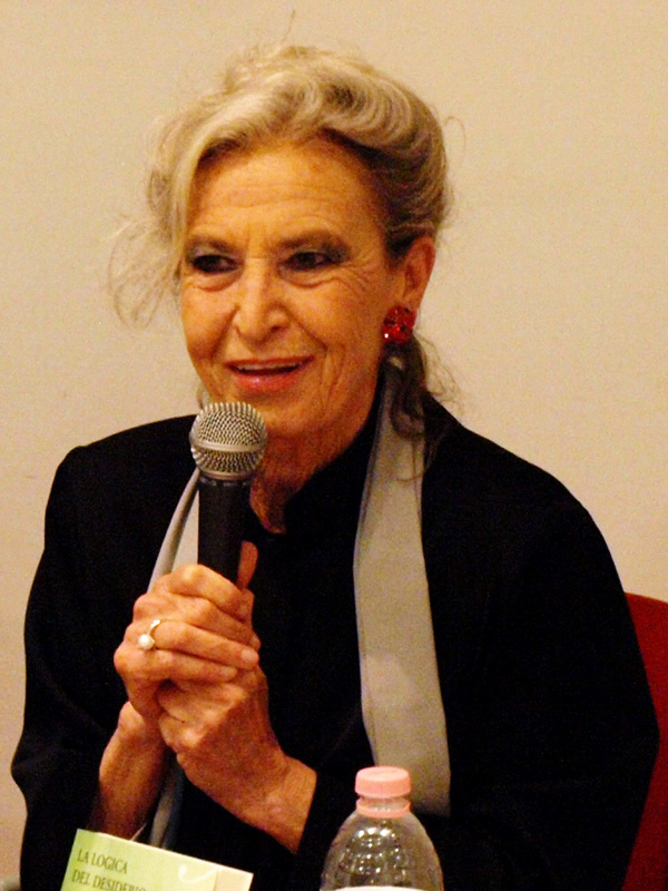 Barbara Alberti - Foto di G. M. Ireneo Alessi (Sinix)